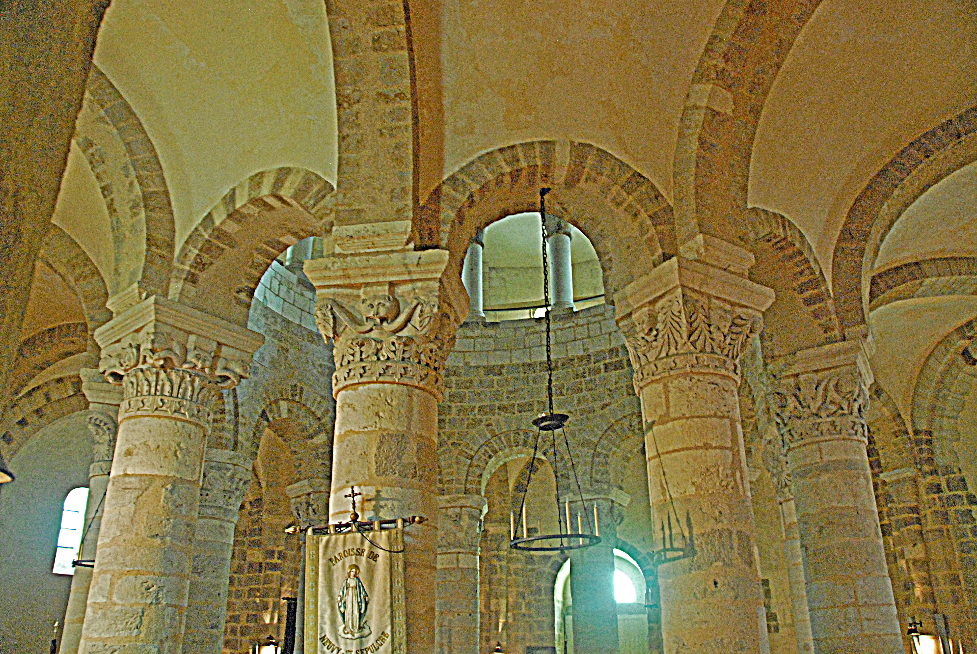 Neuvy_St.-Sépulcre, Rotunde, Arkadenkranz aus Umgang